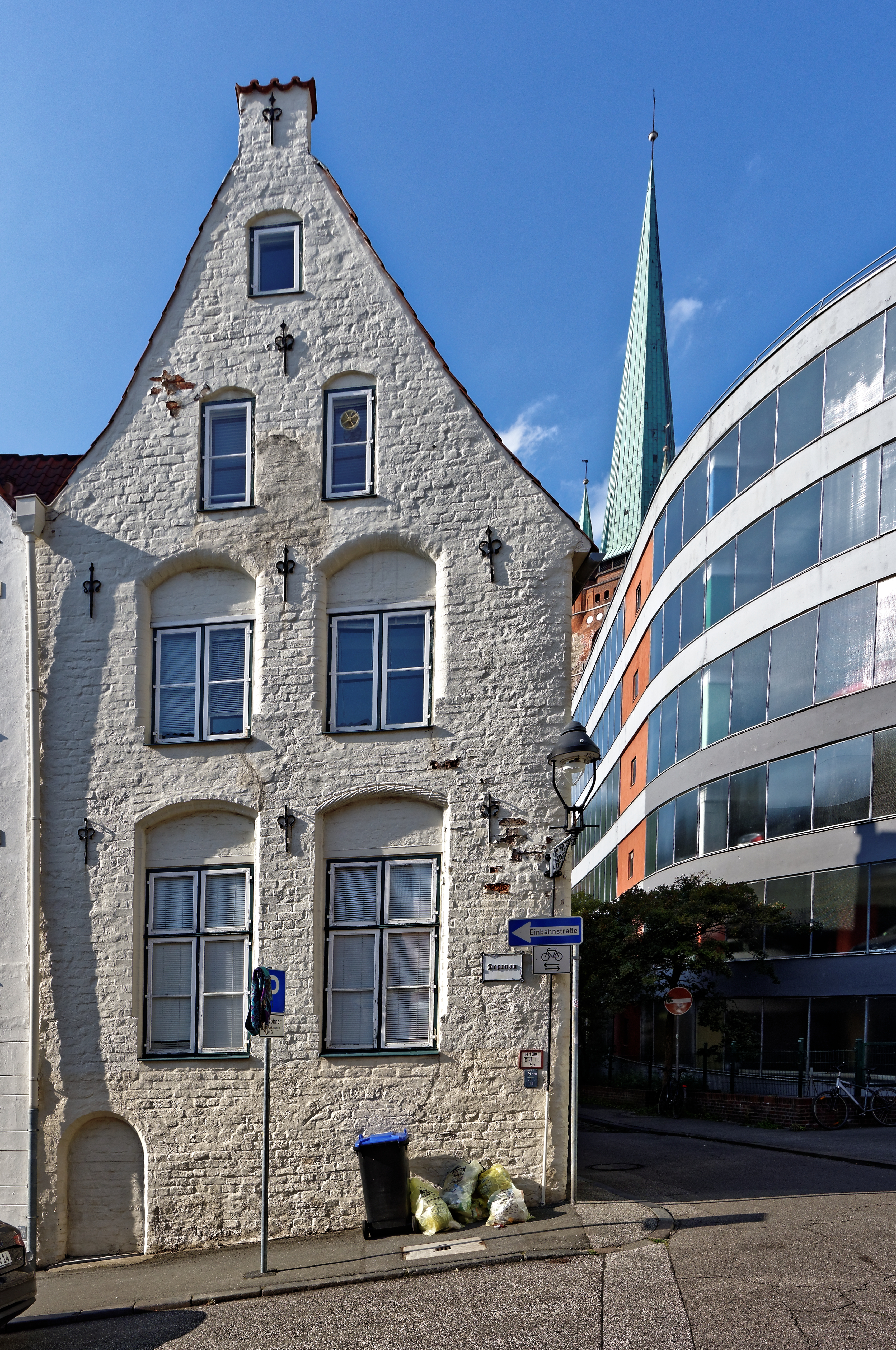 Lübecker Altstadt, Kleine Kiesau 8, Blick aus Depenau